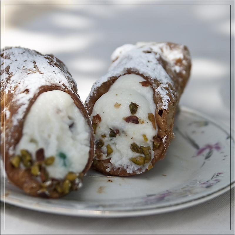 Cannoli siciliani on a plate.